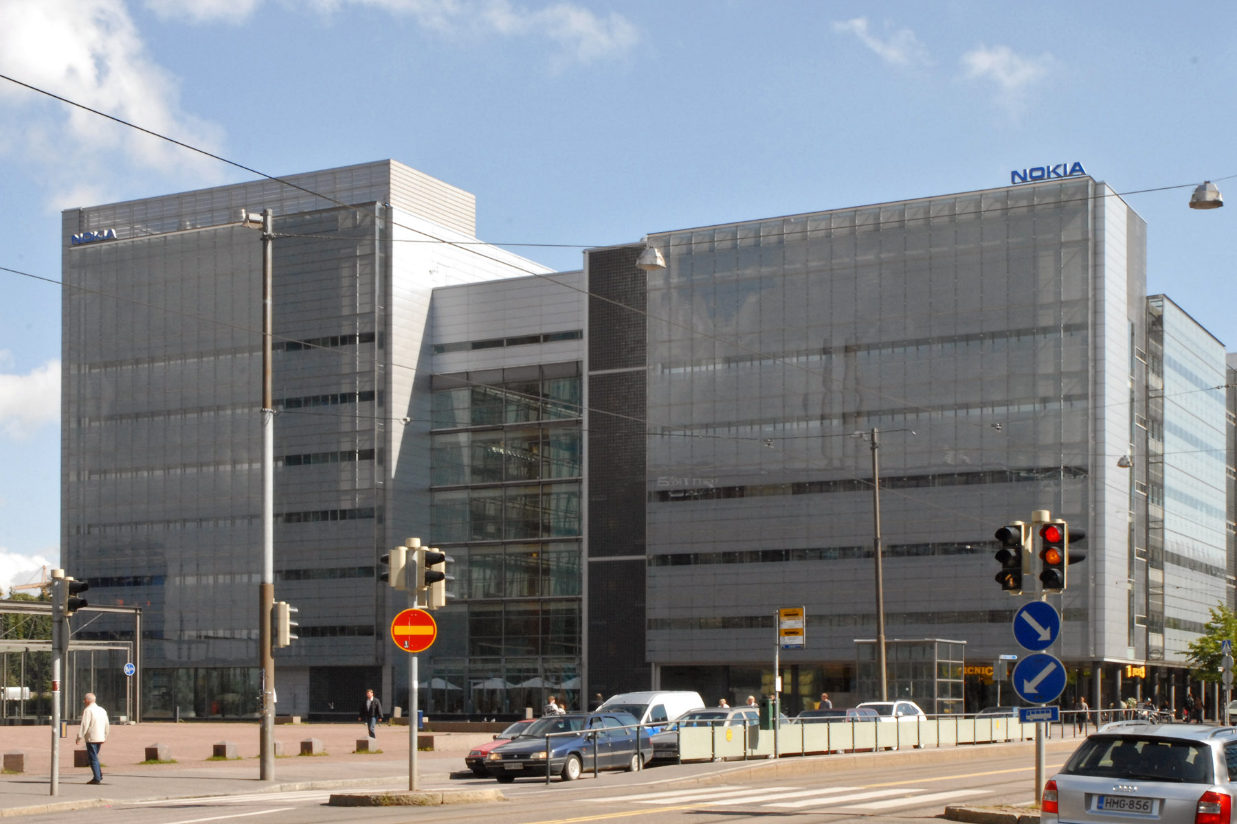 Le centre de recherche de Nokia dans le quartier de Ruoholahti à Helsinki. Les bâtiments datent de 1998, architecte : T. Siitonen